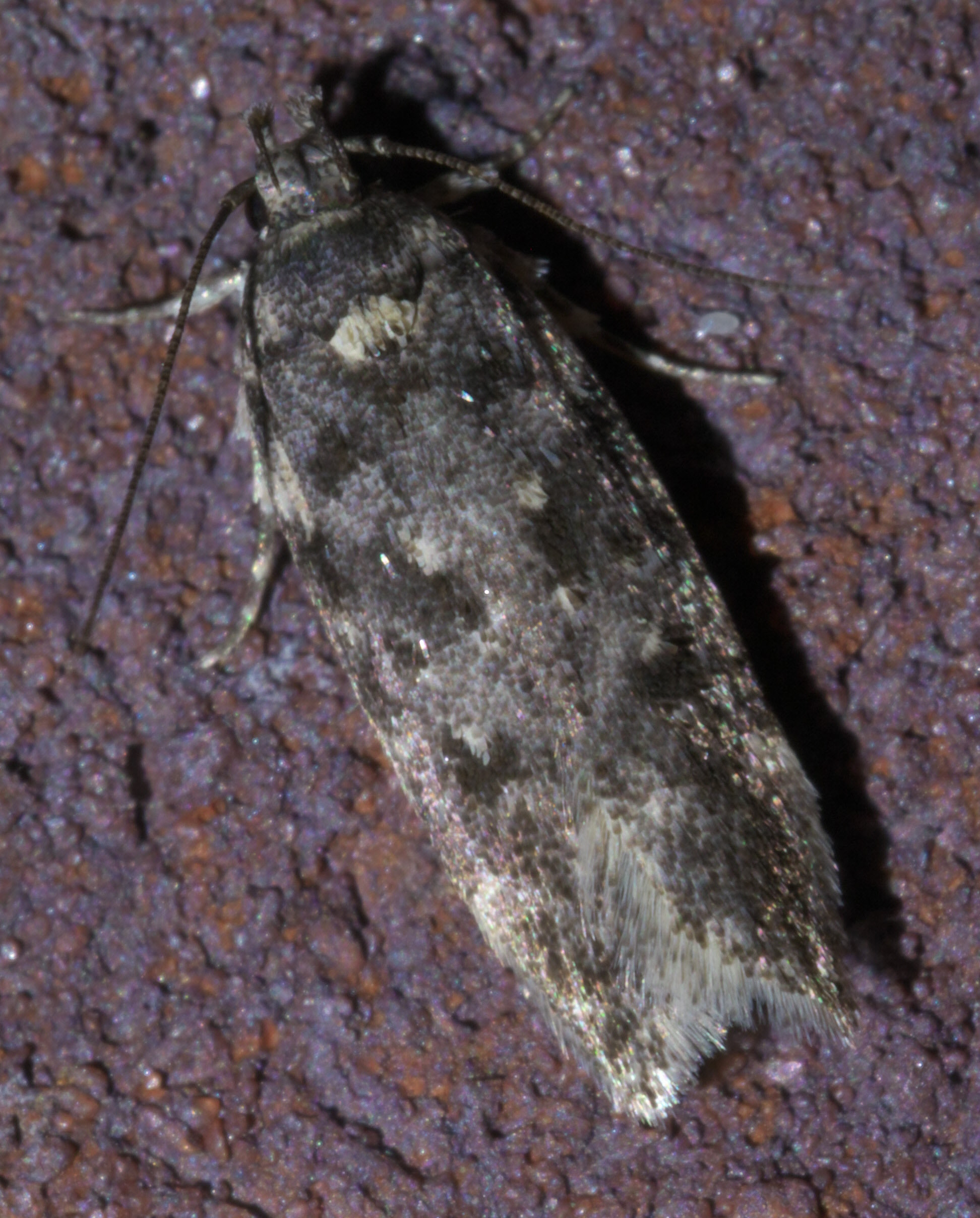 Chionodes fuscomaculella, leaftier, Size: 7.7 mm, ID Confidence: 88